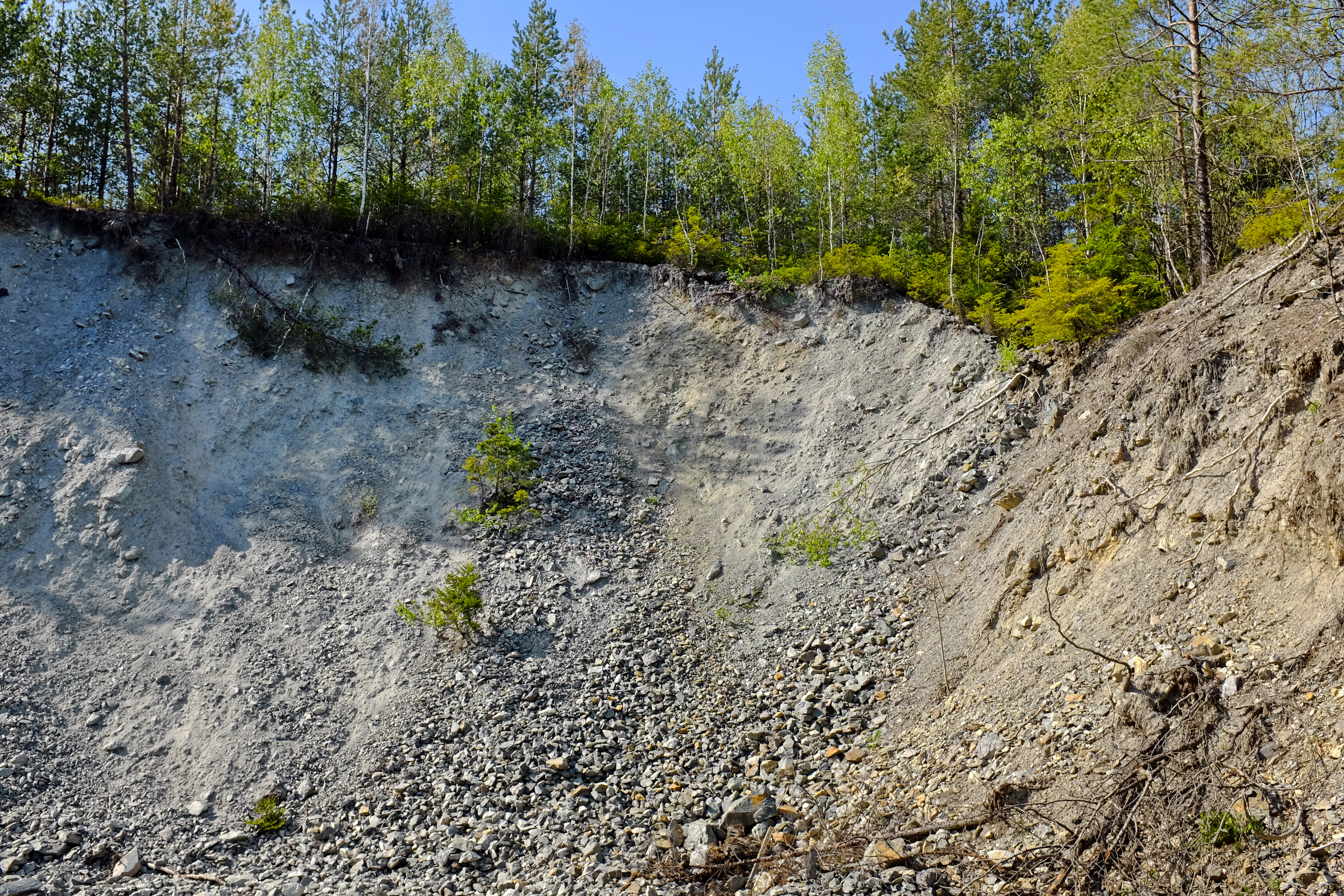 Slatina, zaniklá obec v Českém lese, odvaly uranového dolu Dyleň, okres Cheb